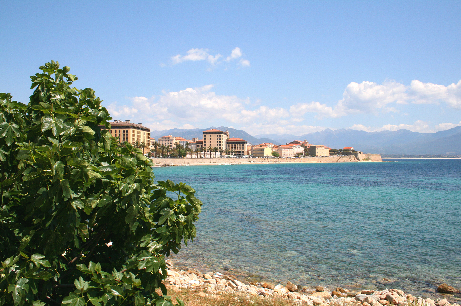 Ajaccio France, la vieille ville vue depuis l'extrémité sud du Boulevard Pascal Rossini.